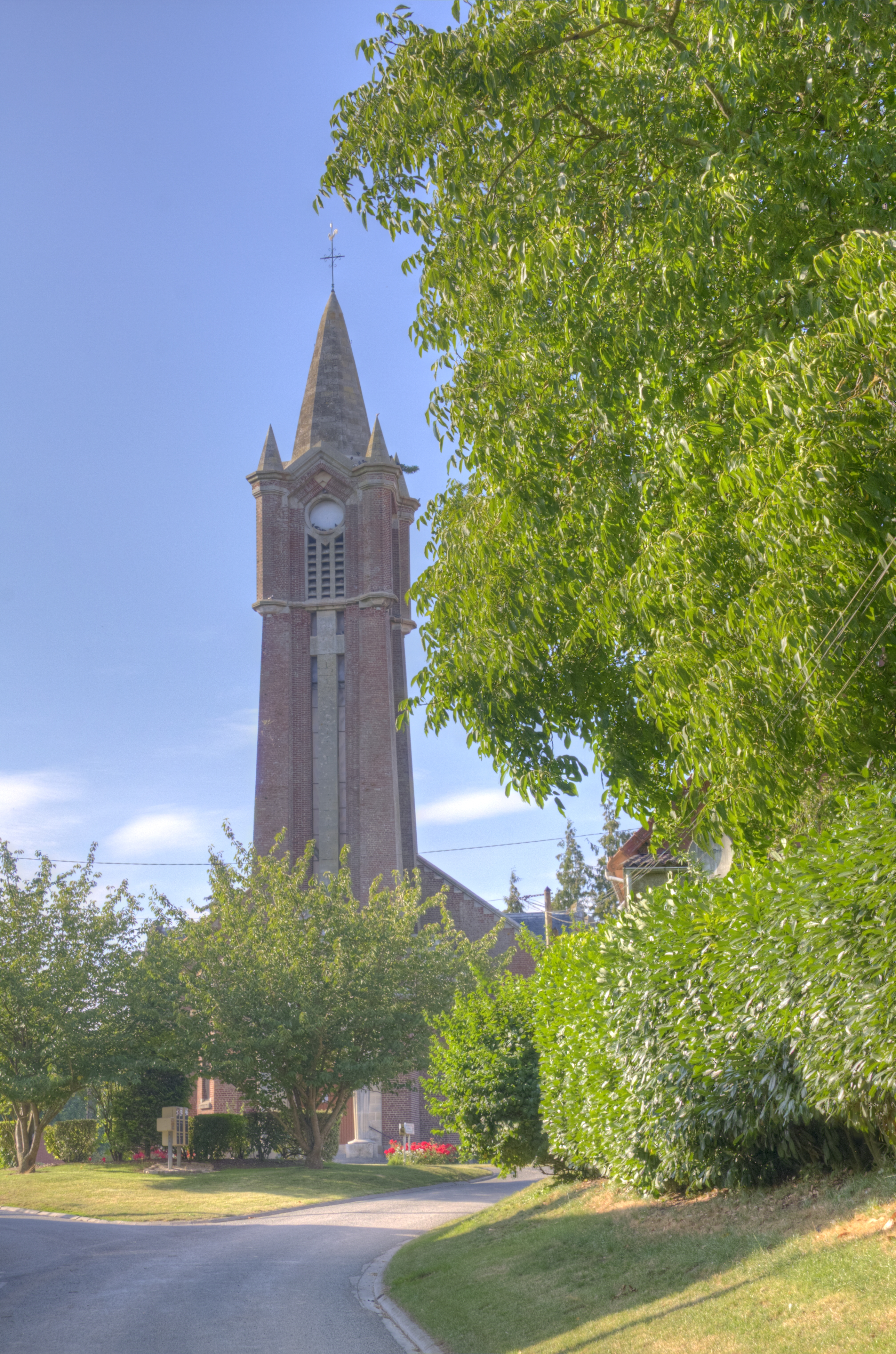 L'église de Sapignies